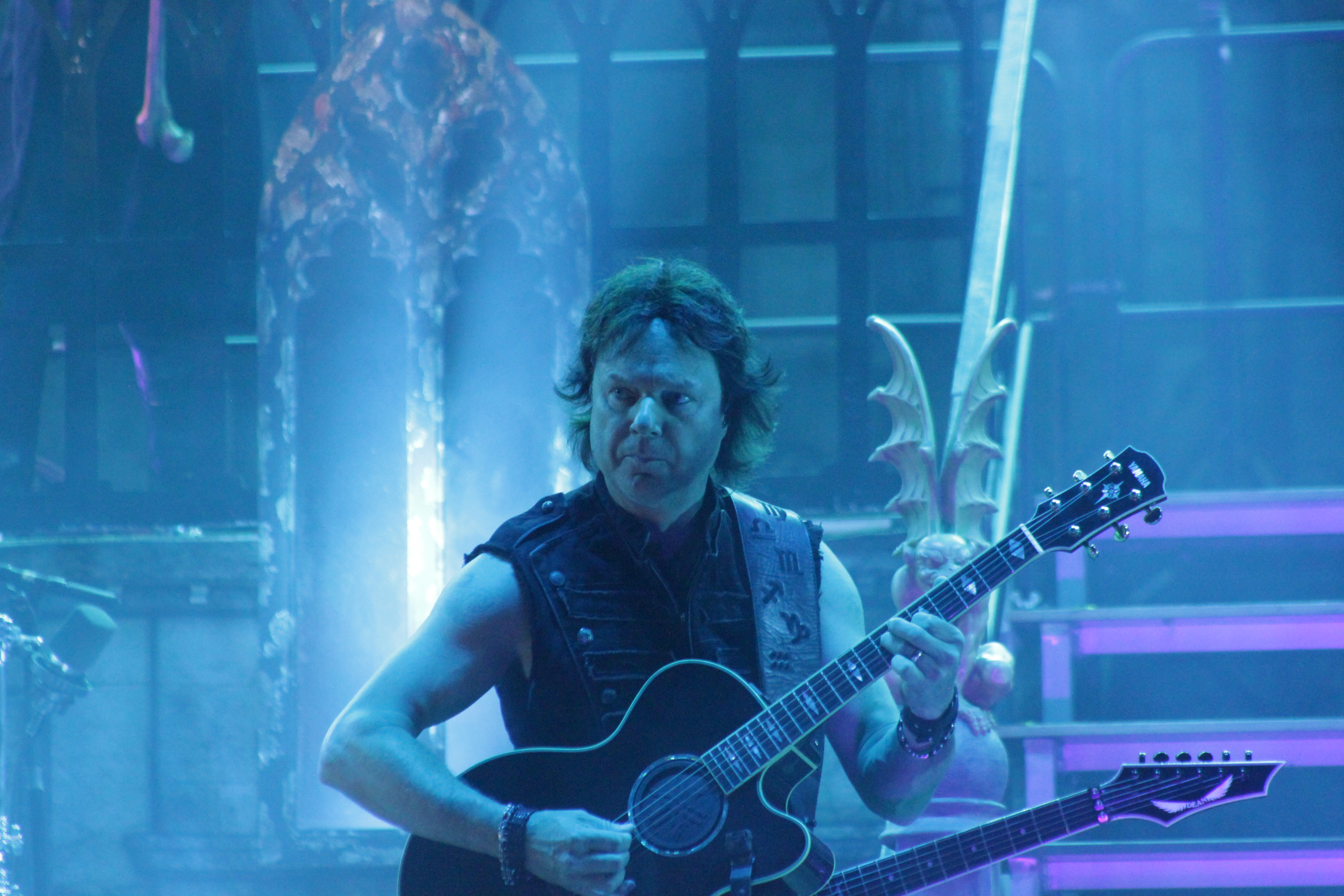 Andy LaRoque, King Diamond, Hellfest 2016.